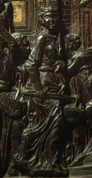 Donatello, miracolo del neonato che parla, dettaglio 03